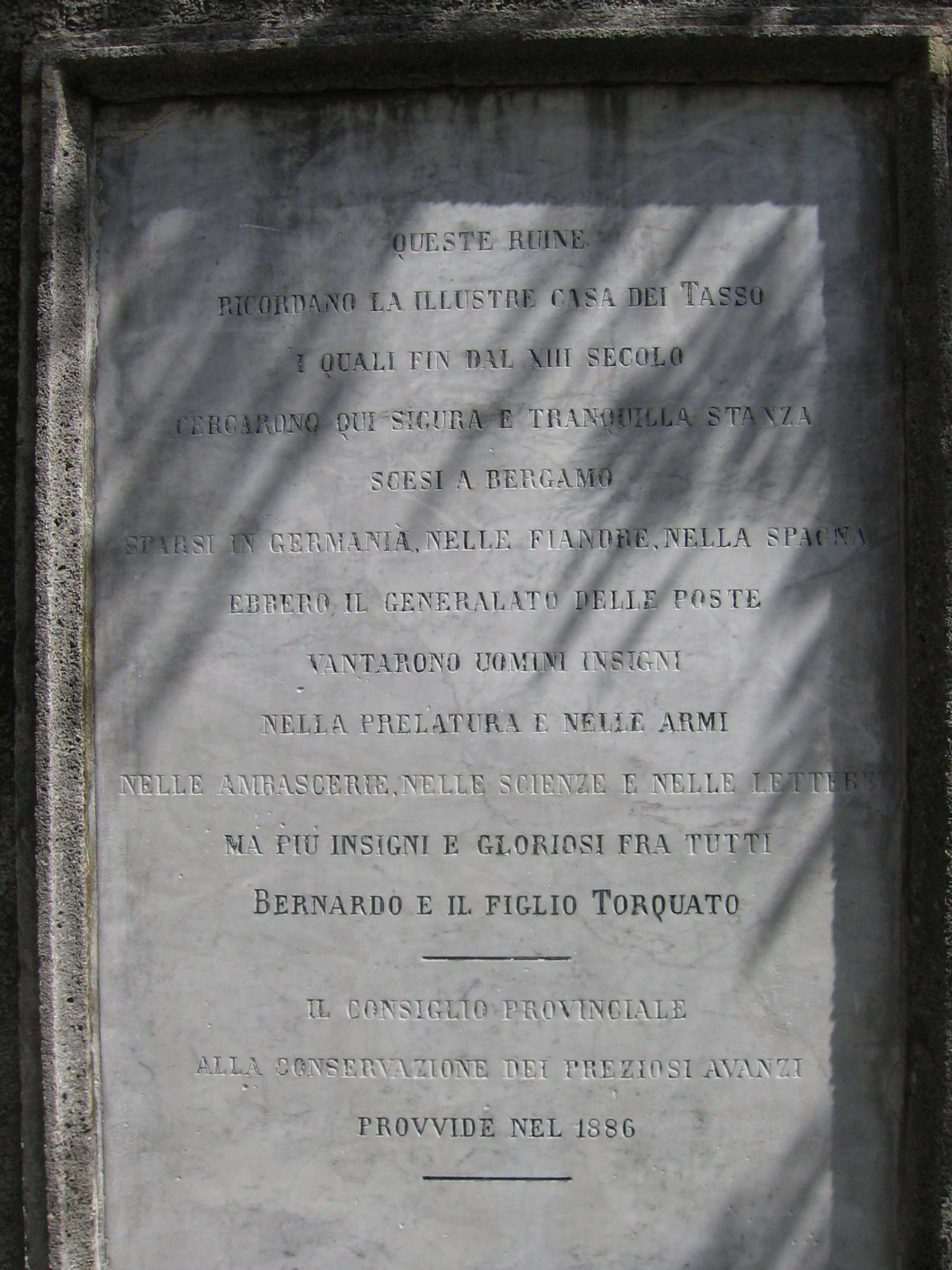 Lapide in memoria della famiglia Tasso, Cornello dei Tasso, Camerata Cornello, Bergamo, Italy.